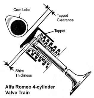 شکل یک سوپاپ و اجزاء آن